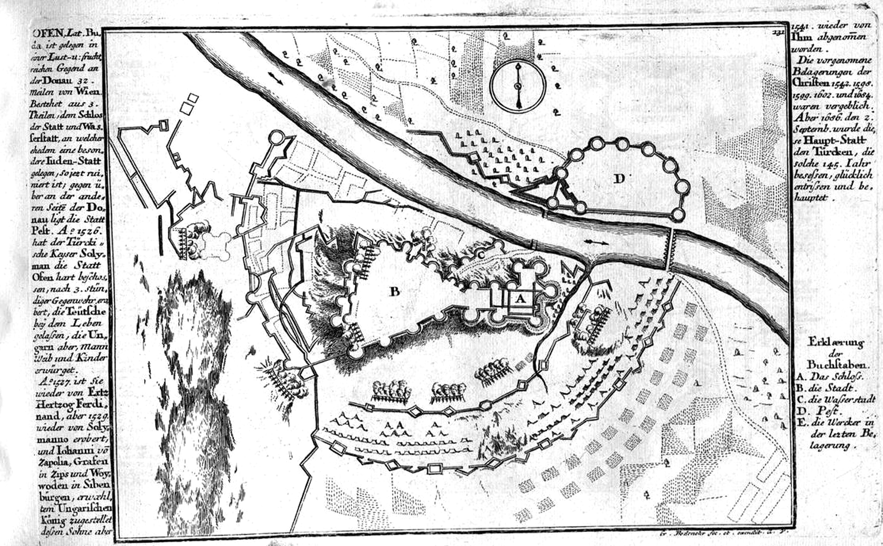 Buda és Pest várának alaprajza